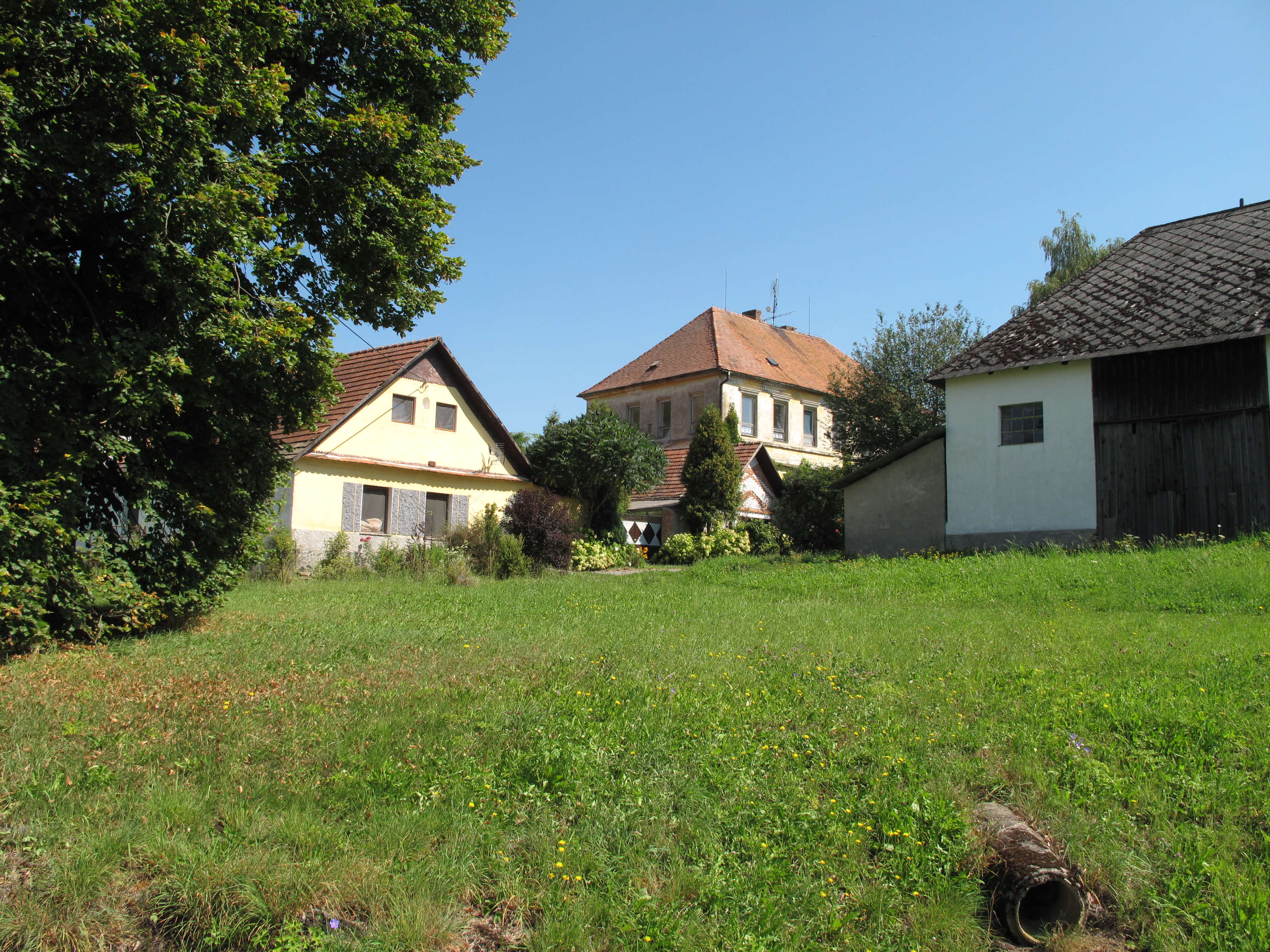 Prasetín. Okres Tábor, Česká republika.